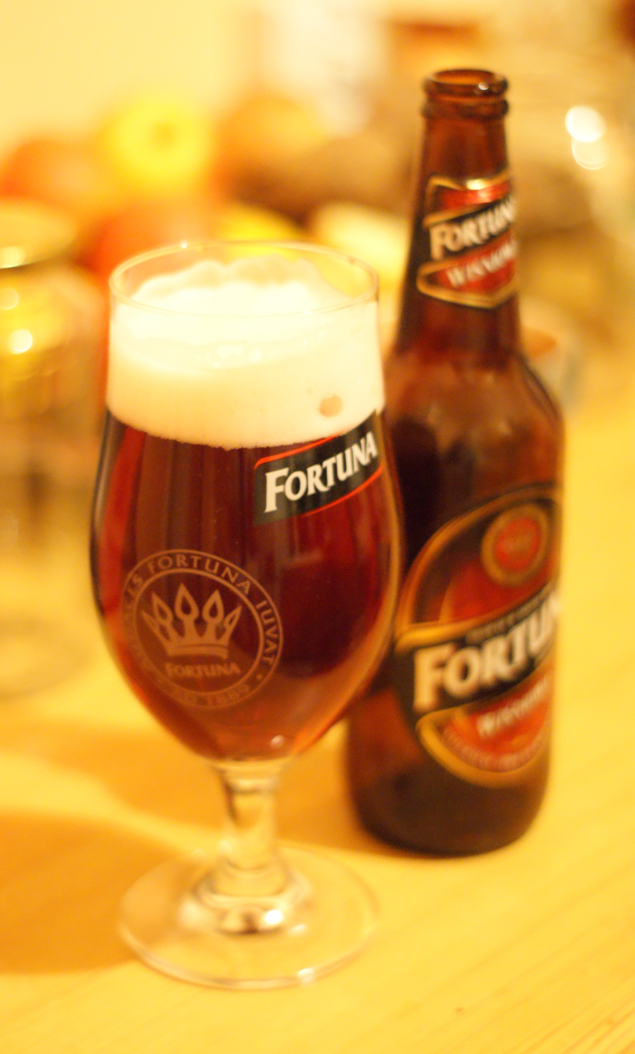 piwo Fortuna Wiśniowa w firmowym kieliszku browaru Fortuna